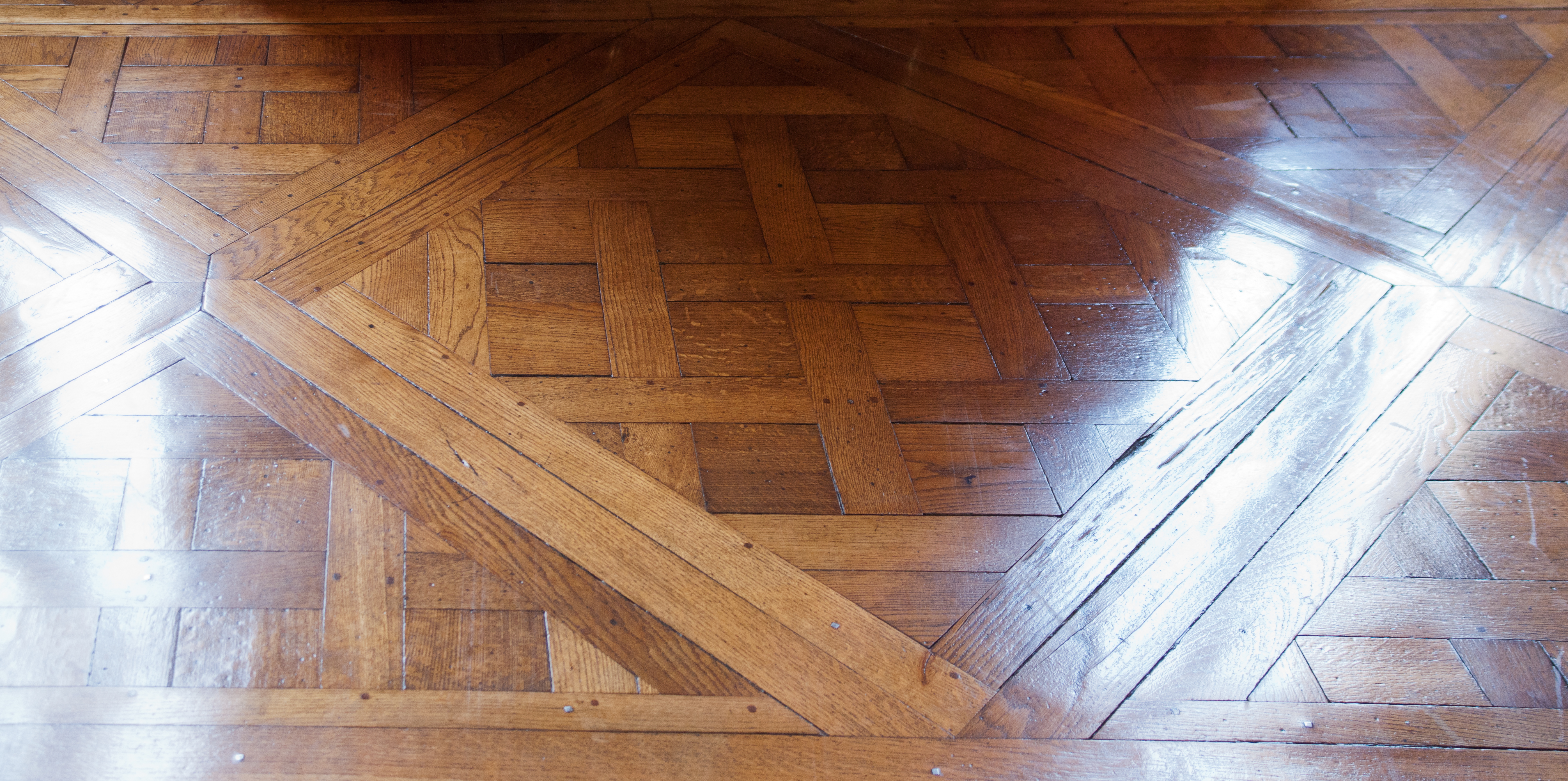 Parquet du Petit Trianon.